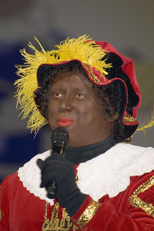 Coole Piet tijdens Het Feest van Sinterklaas